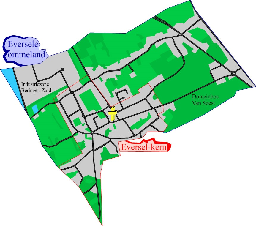 Kaart van Eversel met buurten en belangrijkste plaatsen.